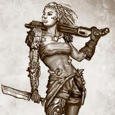 jeden z koncept artów figurki do Neuroshima Tactics